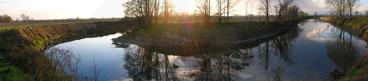 Ansa del Torrente Agogna nella campagna nei pressi di Vespolate (NO)